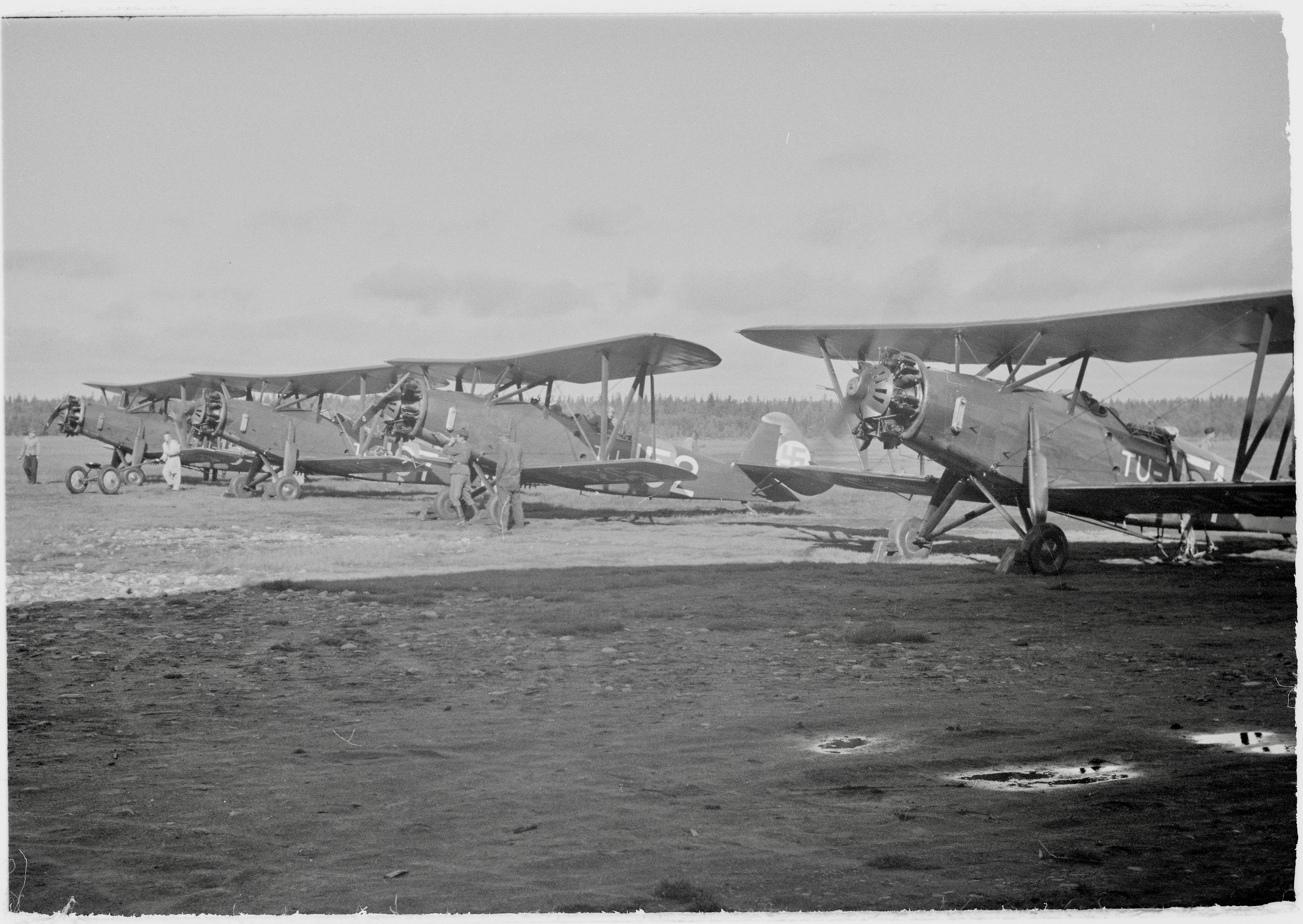 Tähystäjäkurssin Tuiskut rivissä kentän reunassa odottamassa Laajalahden leirin aamupäivälentoja.